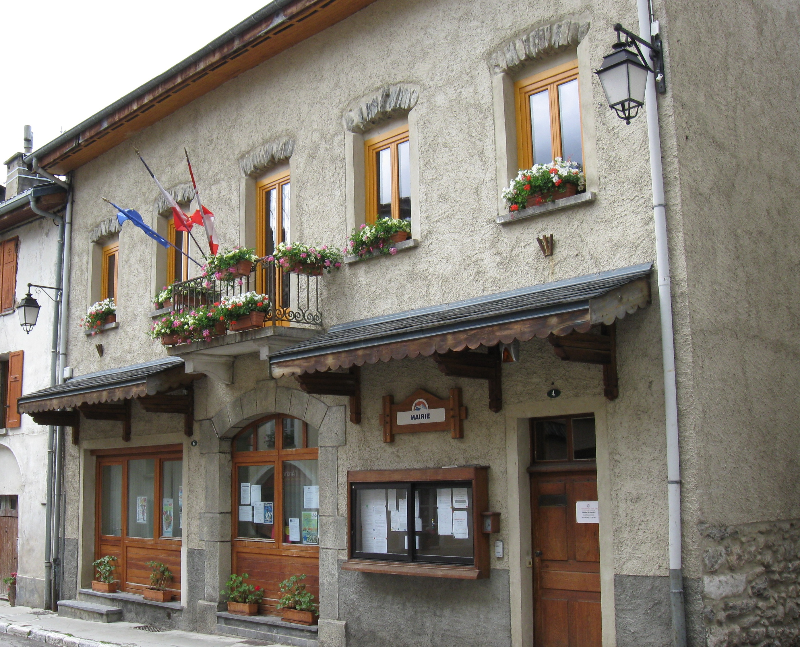 Mairie d'Aussois. (Savoie, Rhône-Alpes).